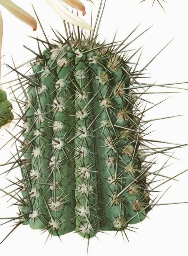 Eulychnia iquiquensis (sin.= Eulychnia breviflora subsp. iquiquensis)